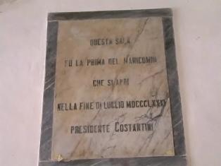 Lapide in stanza al piano terra (1881)